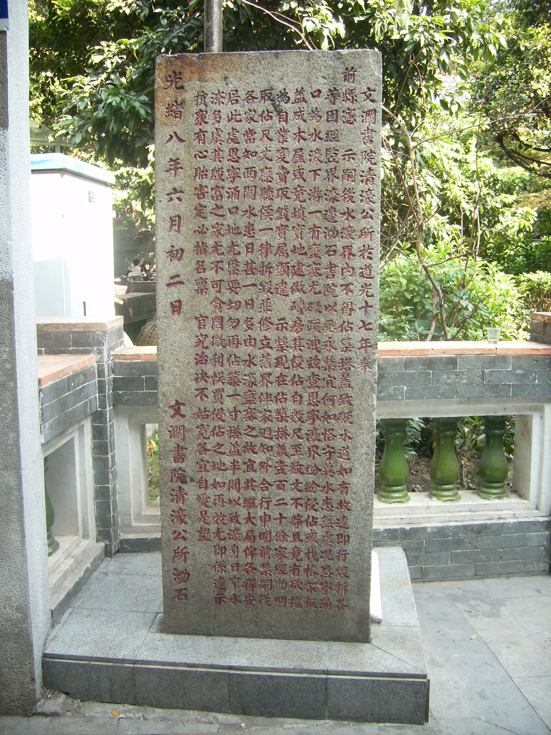 位于荔湾区恩宁路逢庆首约。当时西关地势低洼，西濠经常堵塞，嘉庆十五年(1810)，由西关士绅何太清发起成立清濠公所，为清濠的机构。此碑是西关清濠公所文告。因此地荔枝湾改造，此碑现下落不明。